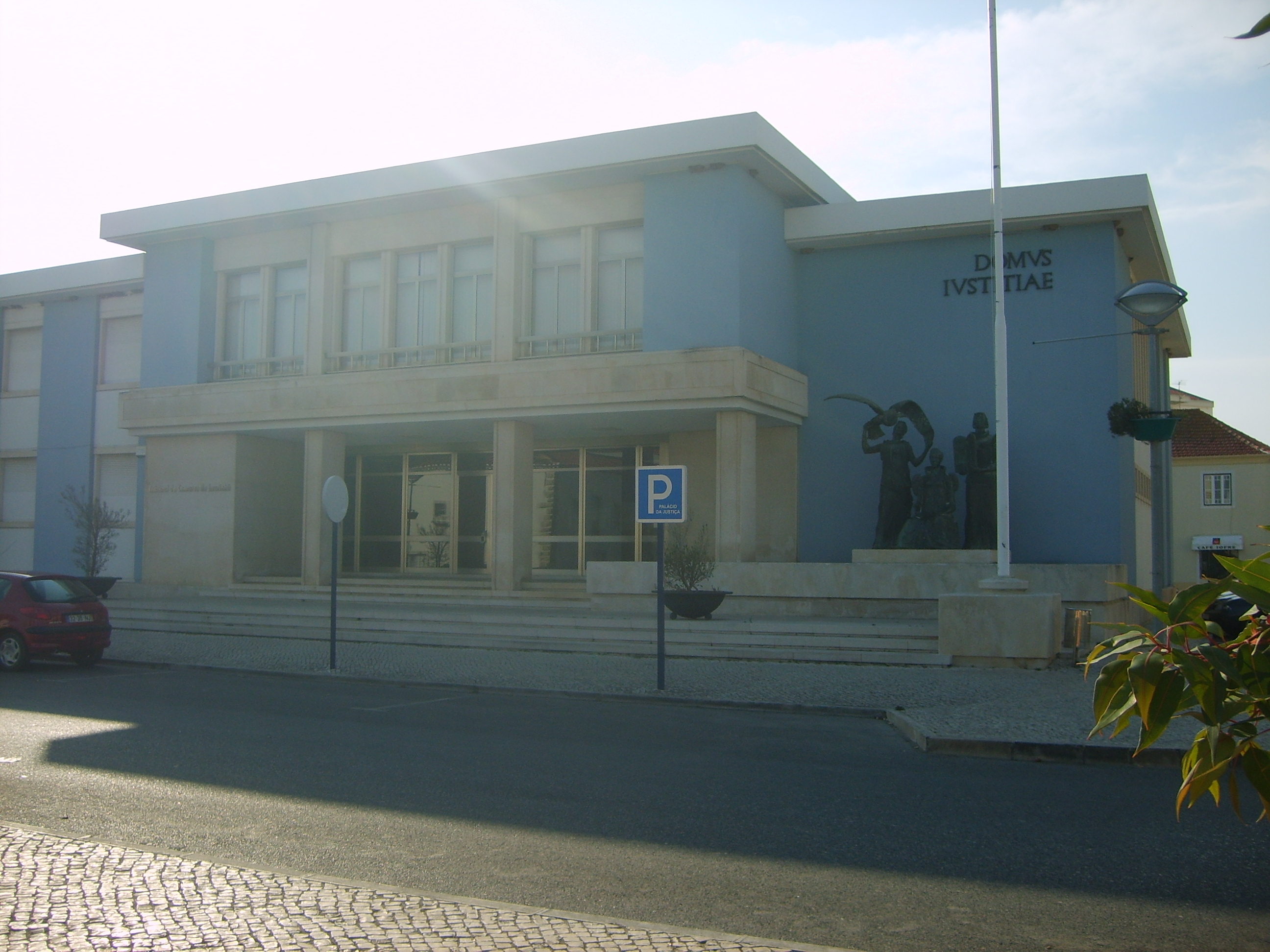 Palais de Justice (Lourinhã)